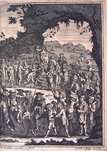 La visita de los chistes, Amberes, por Henrico y Cornelio Verdussen.